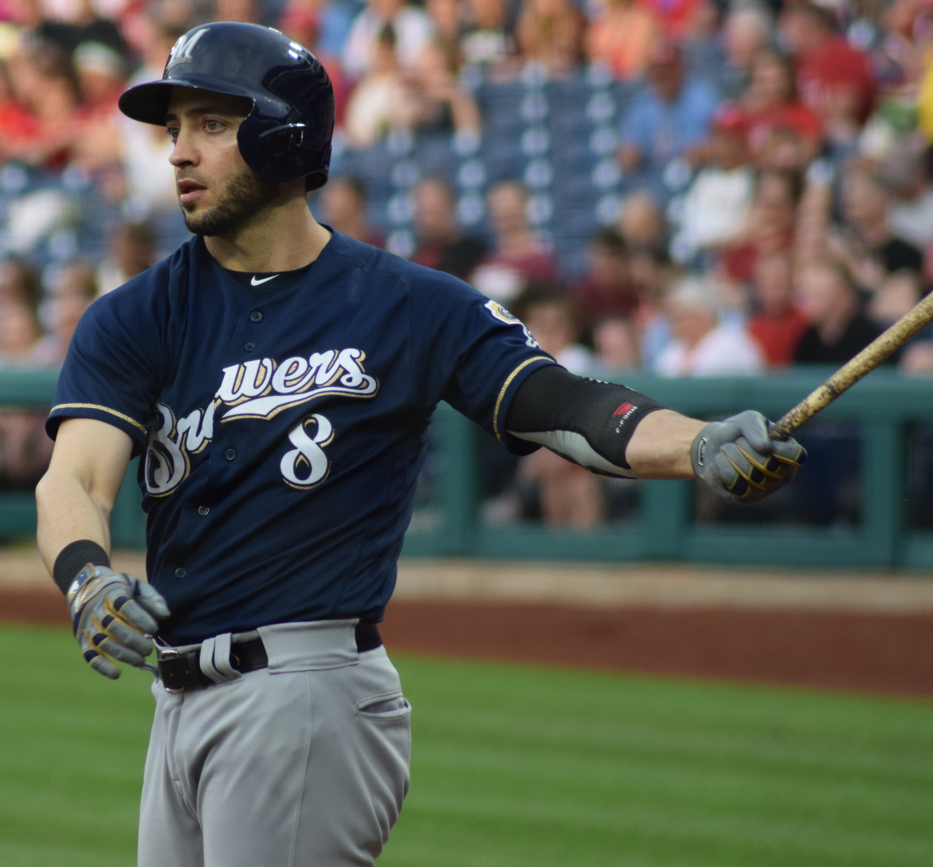 Ryan Braun